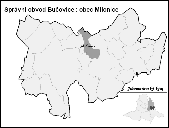 Hranice Milonice (Vyškov-(Bučovice)- Czech republic)